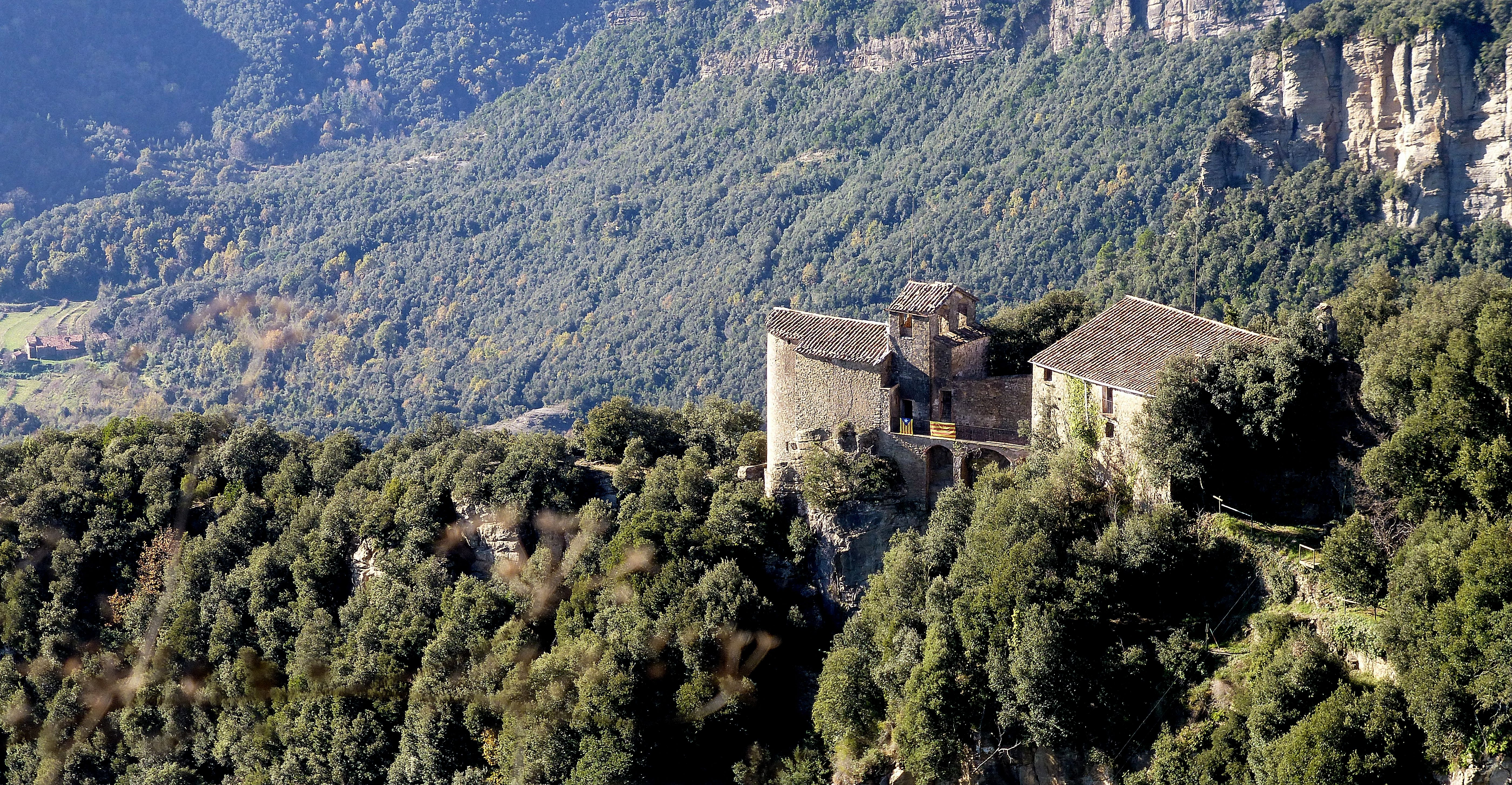 Castillo de Finestrás